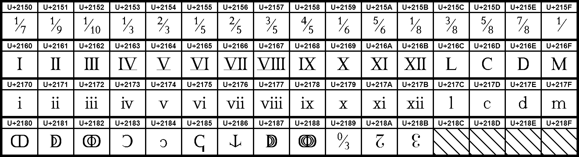 Grafiktafel für den Unicodeblock Zahlzeichen. Schraffierte Felder sind unbesetzte Codepoints.